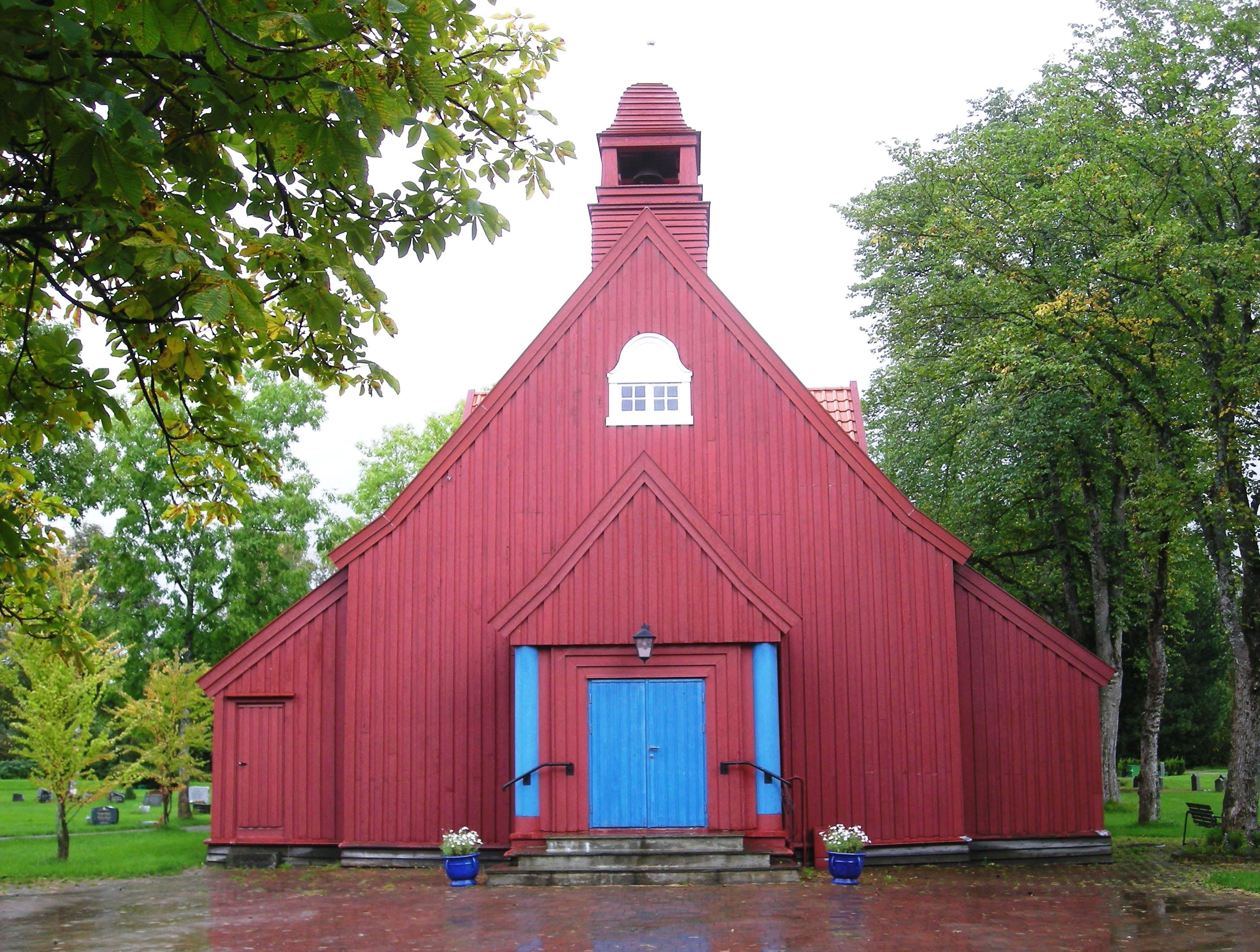 Stavne kapell i Trondheim